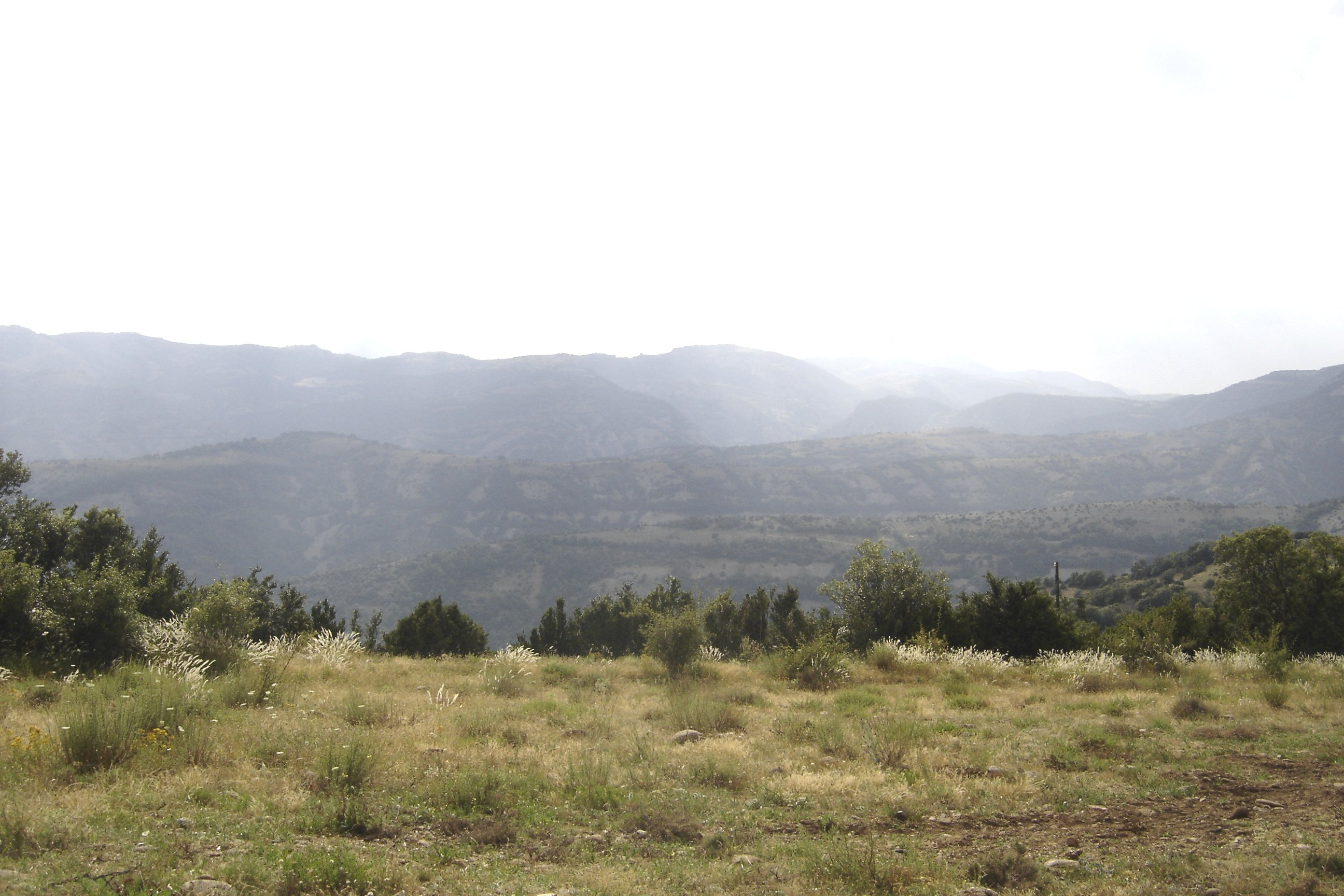 En pimer terme, la canal de la Rasa de Balletbò. A continuació, la canal del Riet de la Plana i en darrer terme, la de la Ribera dels Perxets (Odèn) (Solsonès). Fotografia feta des de la Caixa del Moro